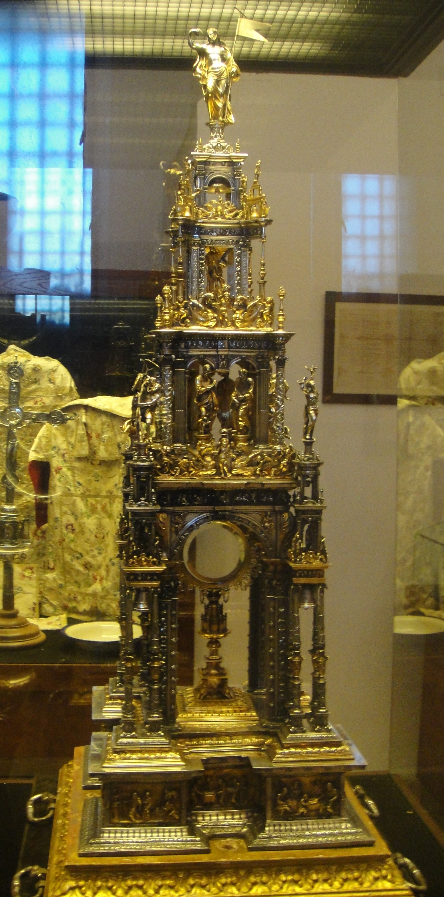 Custodia procesional de Fuente Obejuna, provincia de Córdoba, (España).